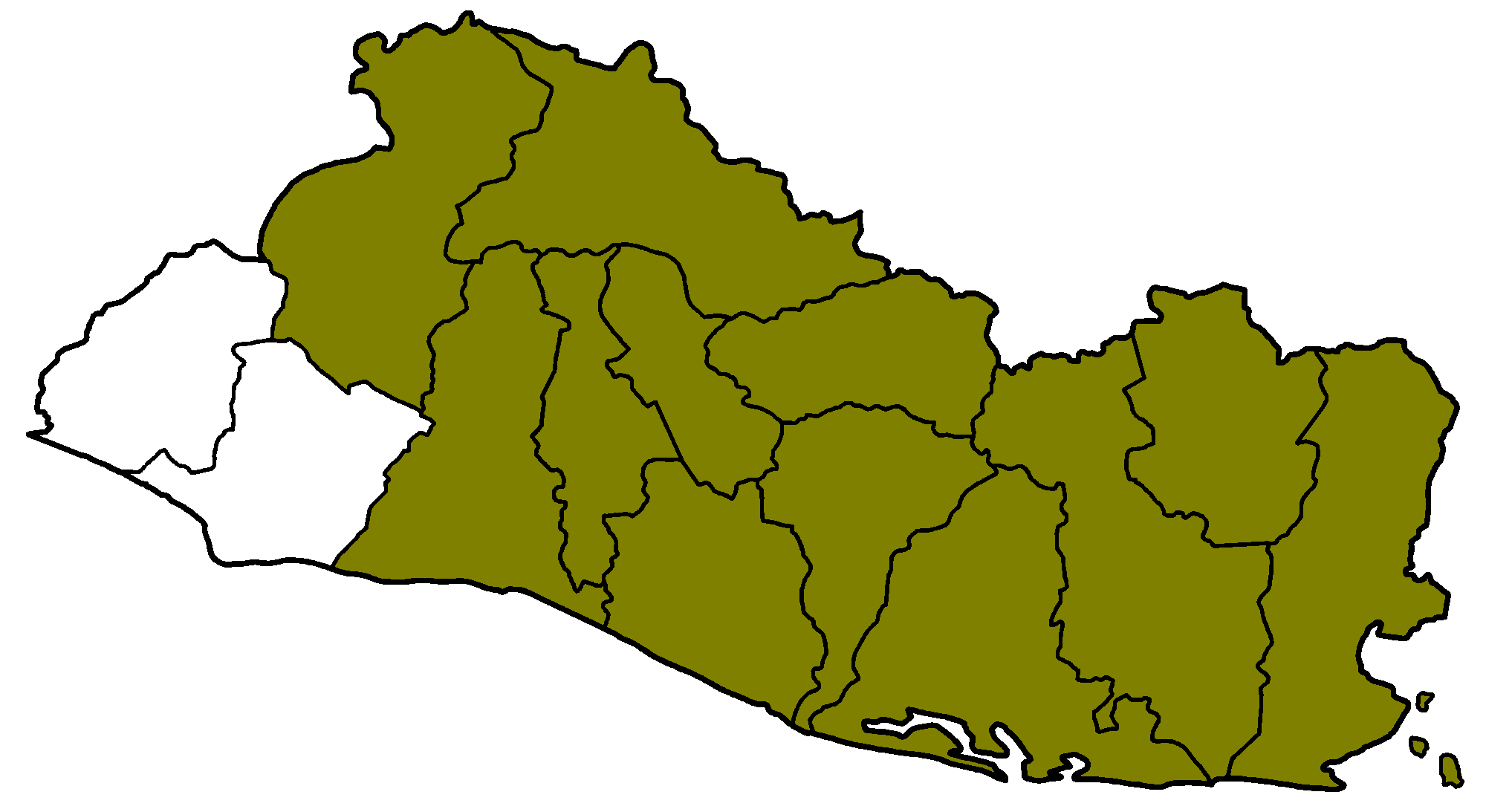 Este archivo fue creado copiando de File:El Salvador departments blank.png y luego editado en el programa paint. Fue hecho por Juan Miguel. Esta imagén muestra el territorio de la Intendencia de San Salvador (1786 - 1824).